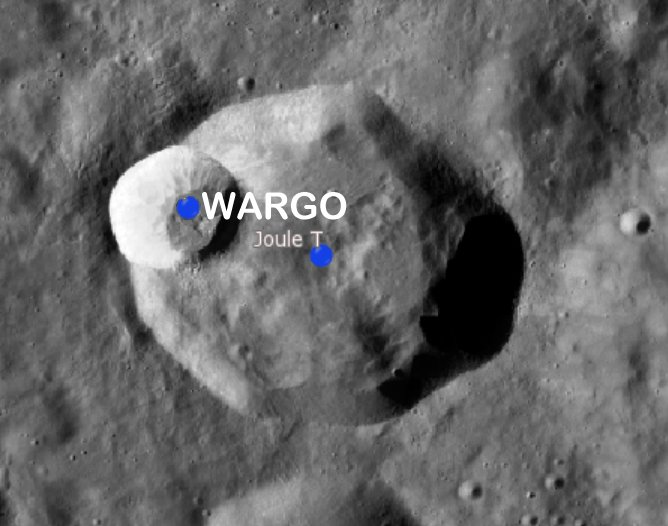 Cráter lunar Wargo. (Imagen LRO)